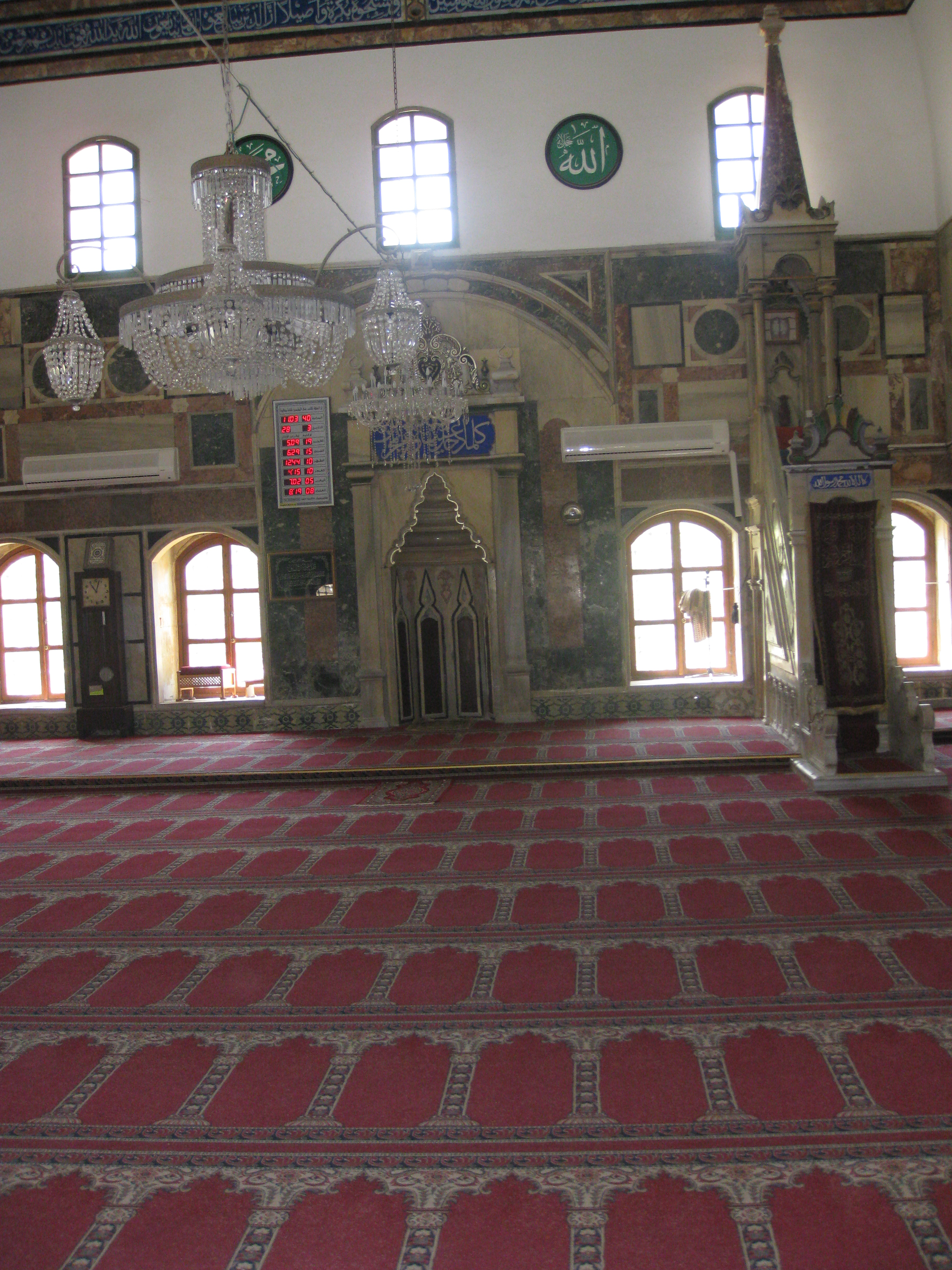 Al Jazar Mosque מסגד אל ג'זאר בעכו